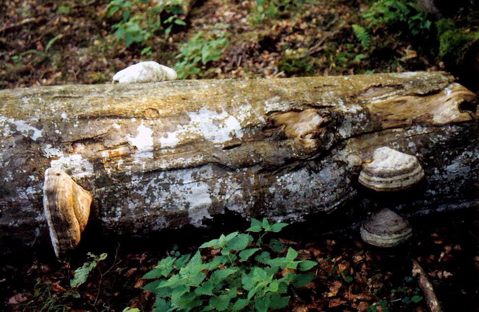 Fomes fomentarius Zunderschwamm auf Totholz